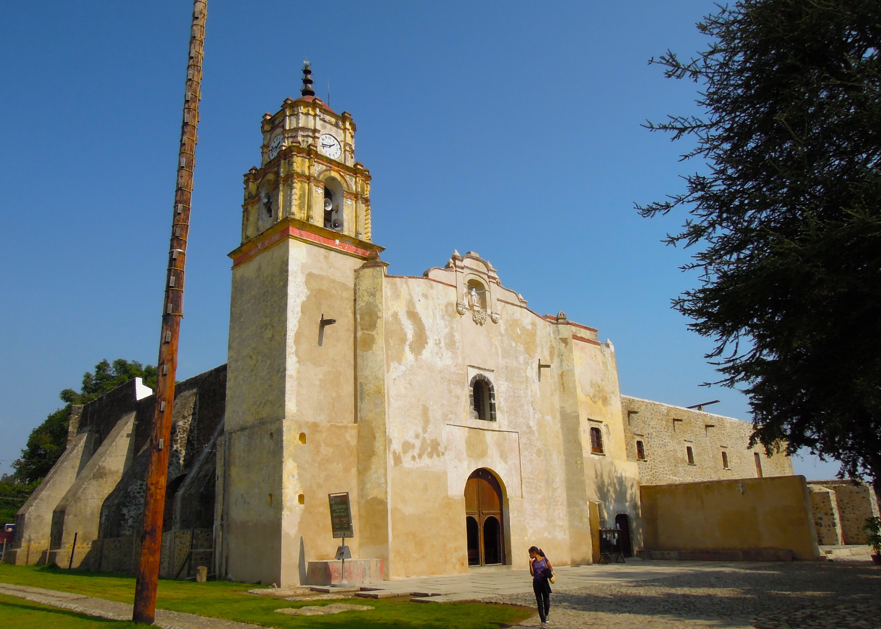 Ubicado en Tetela del Volcán, Morelos, México. De los 14 monasterios del siglo XVI en las faldas del Volcán Popocatépetl que en 1994 fueron reconocidos por la Unesco como Patrimonio de la Humanidad.